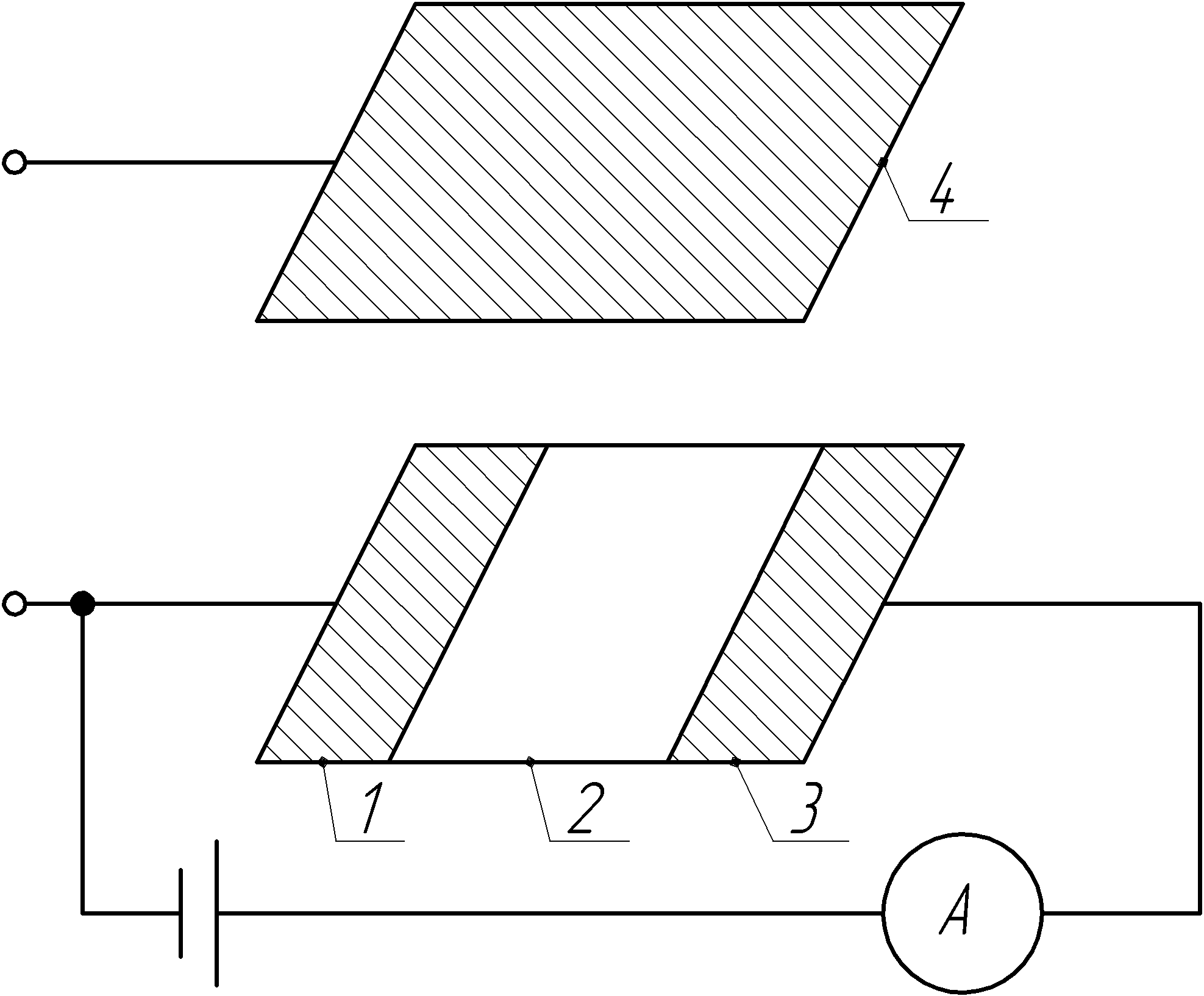 Иллюстрация из патента на полевой транзистор (автор О. Хейл, Британский патент №4394557)